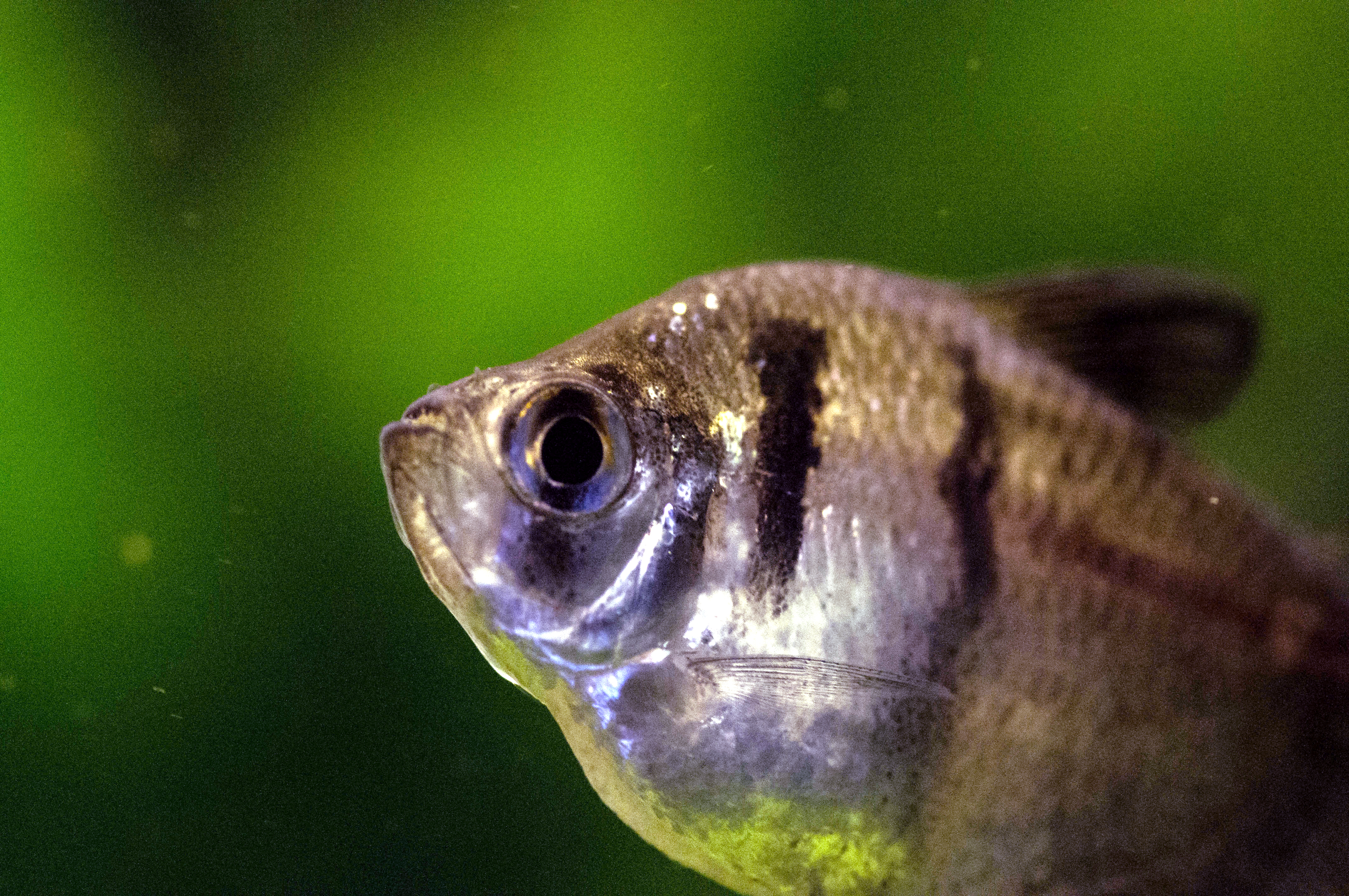 Adulter Trauermantelsalmler, Gymnocorymbus ternetzi